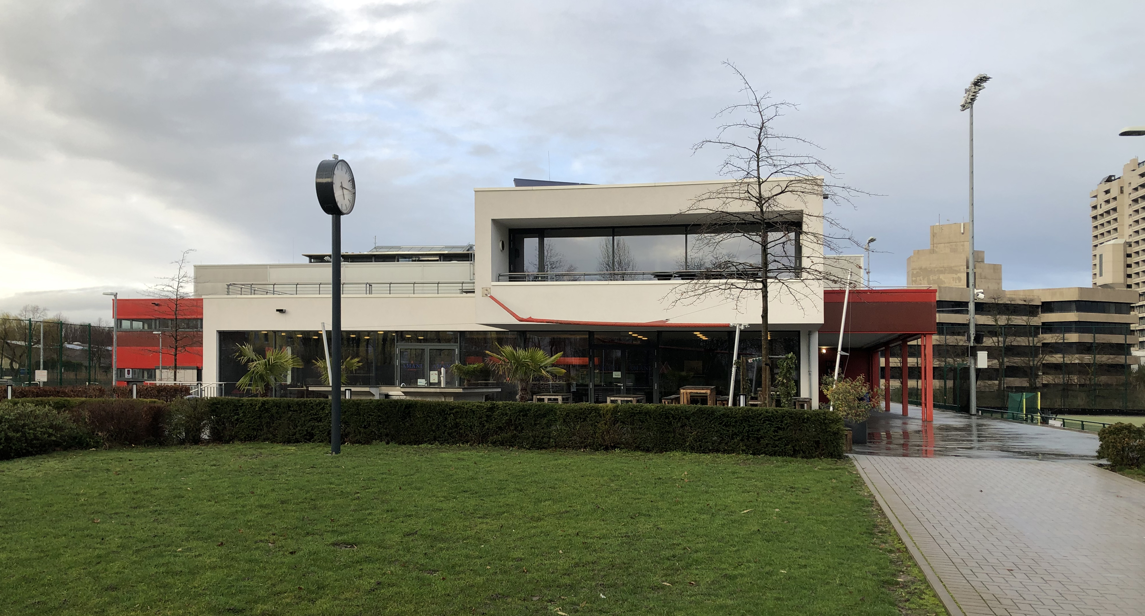 Am Seestern 10, Düsseldorf-Lörick – Düsseldorfer Hockey Club 1905 (DHC), Hockey- und Tennisclub mit DHC Club-Restaurant